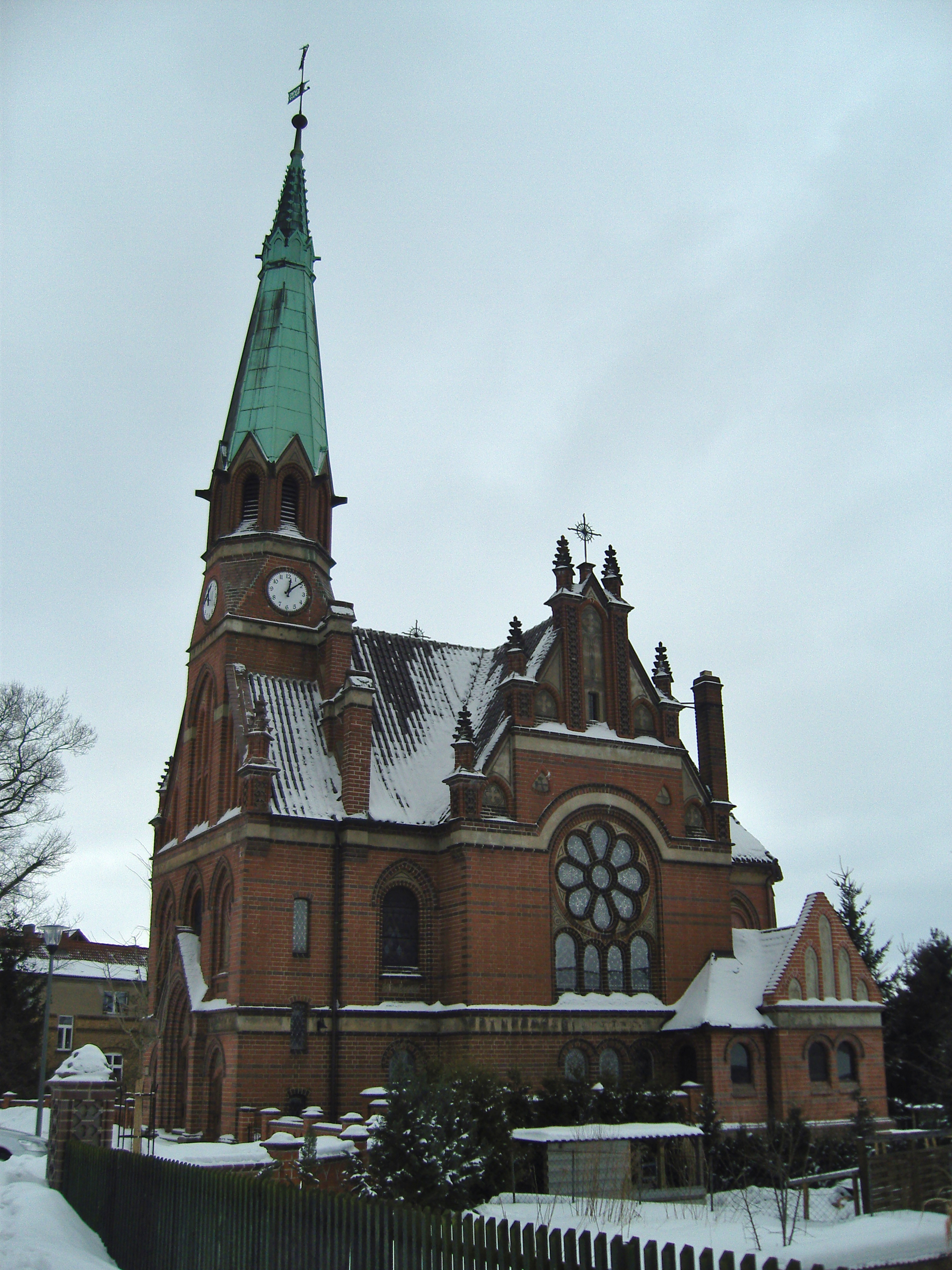 Henriettenkirche in Annahütte - Baudenkmal